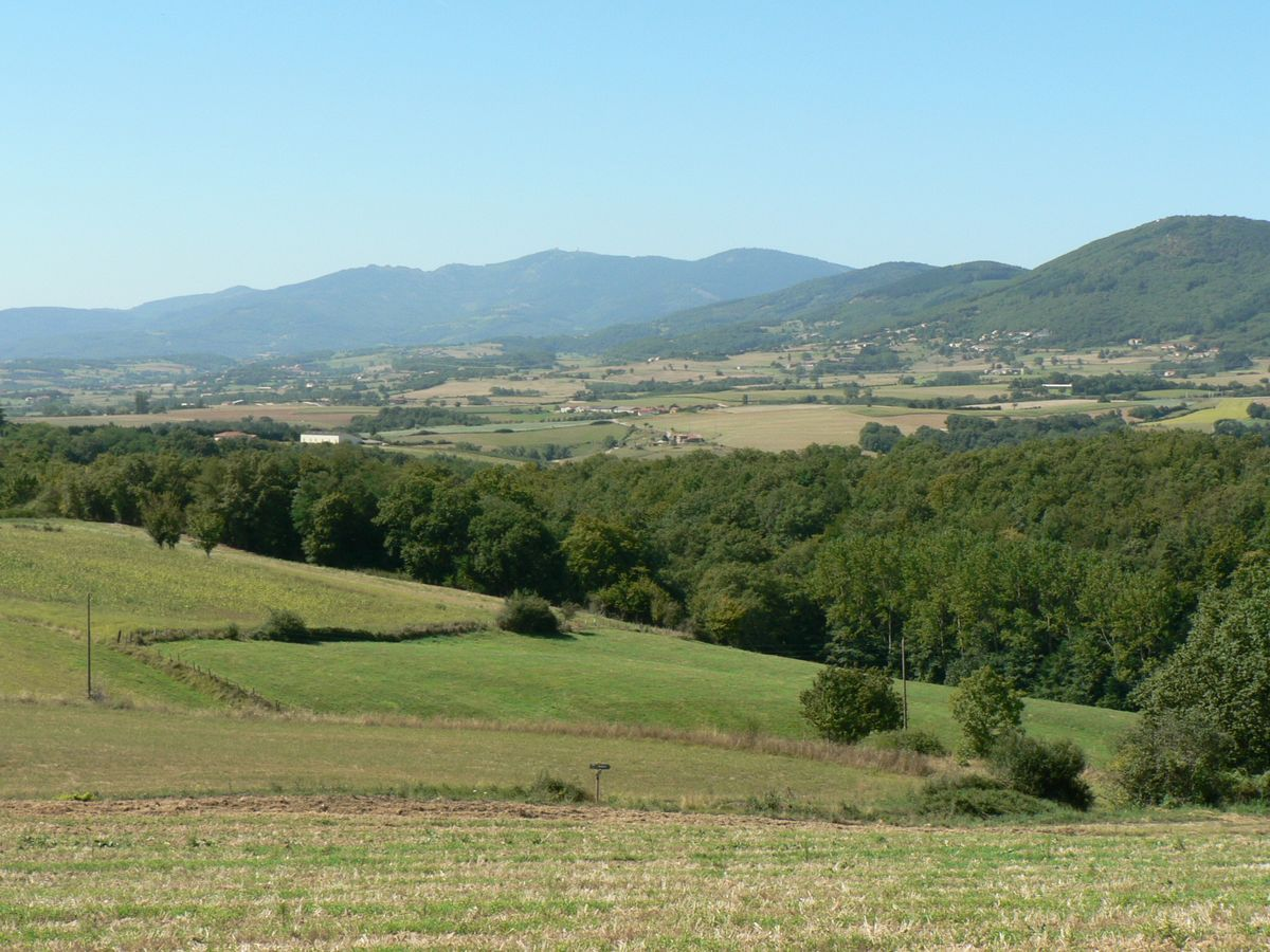 Les ravins rhodaniens, un écosystème exceptionnel